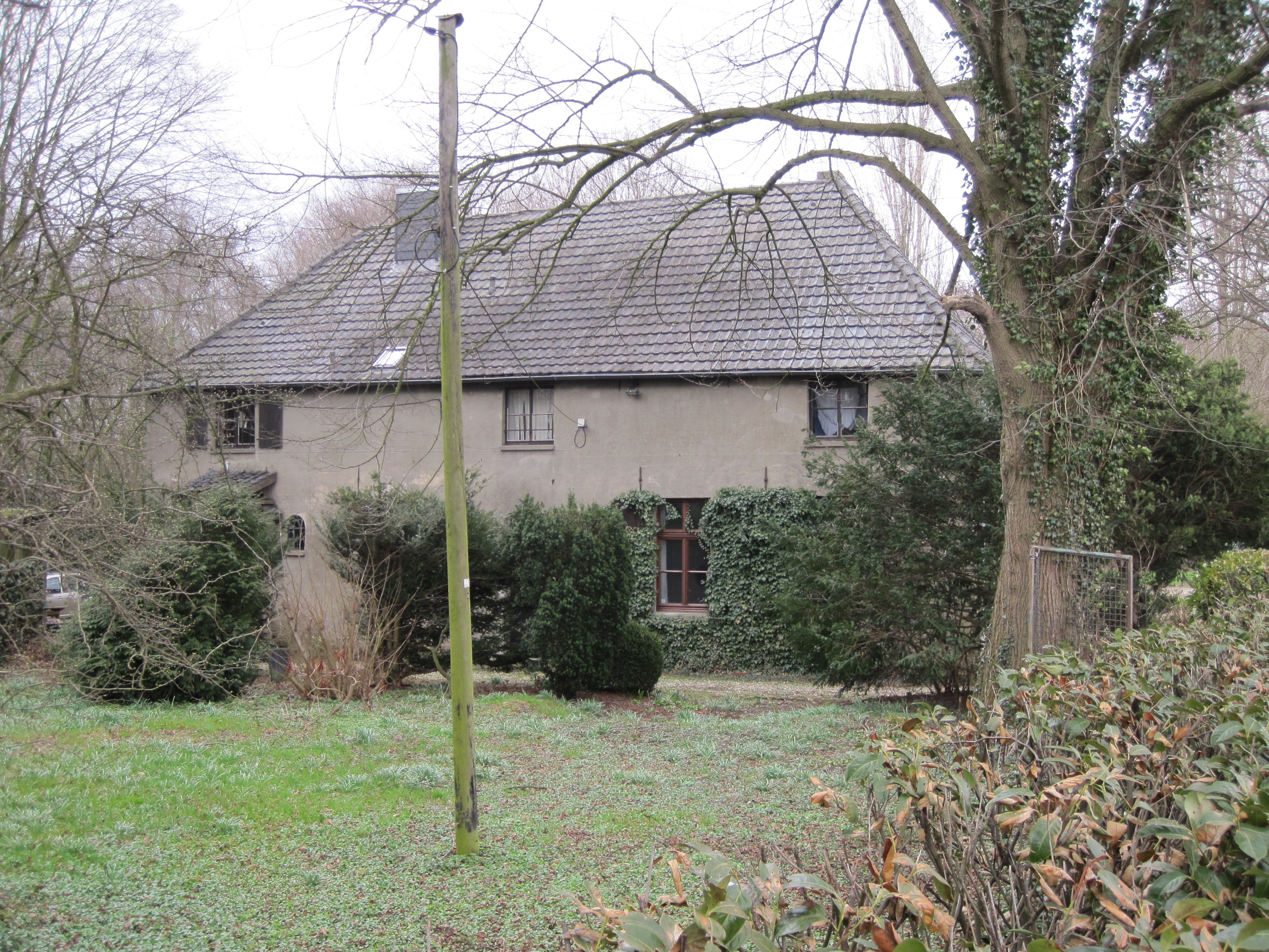 Kranenburg-Nütterden, sogenanntes Haus Klarenbeek (ehemaliger Elsenhof)